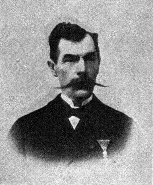 Österreichischer Politiker, Reichsratswahl 1907, Name siehe Dateiname